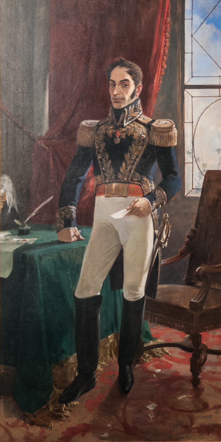 El Libertador en traje de campaña. 1895. Oleo sobre tela. 240 x 126,5 cm. Asamblea Legislativa del Estado Anzoategui. 1895.